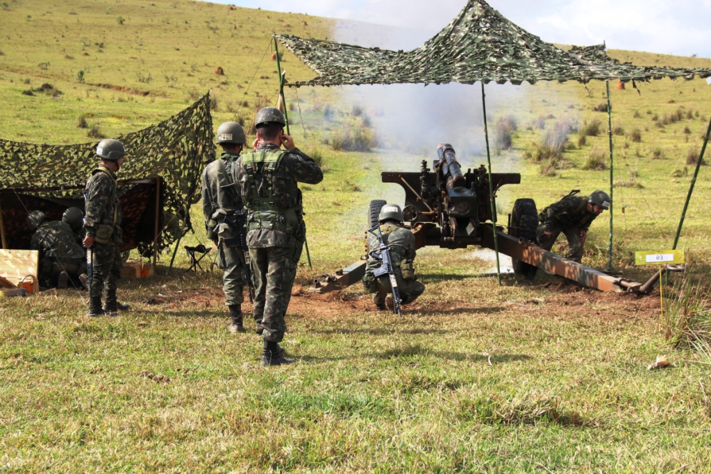 3º Exercício de Longa Duração CArt ESA